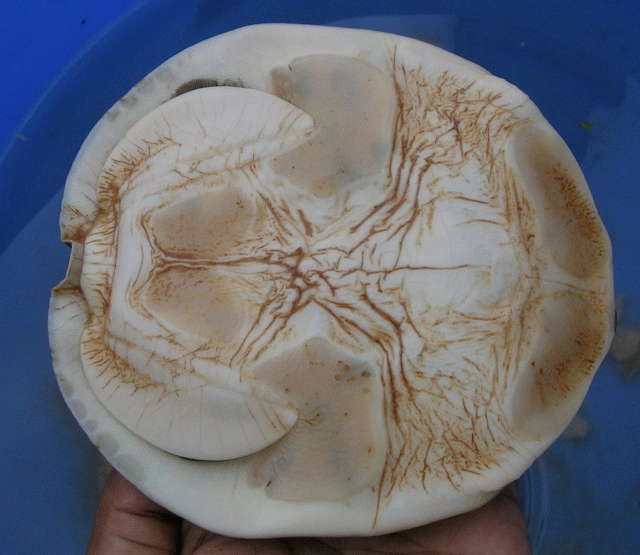 Lissemys punctata, Bannerghatta Bangalore